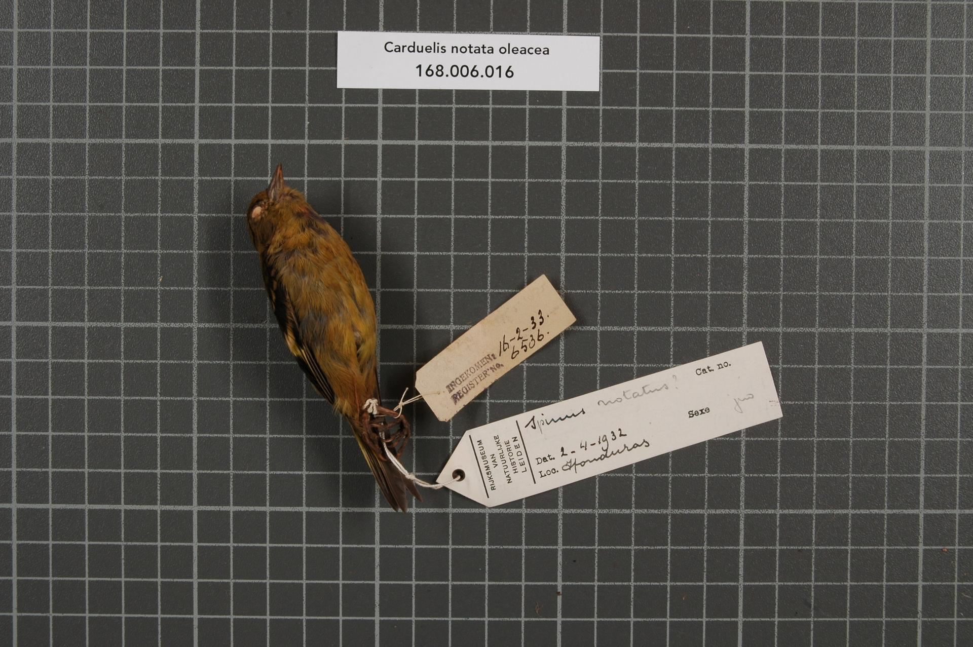 Carduelis notata oleacea (Griscom, 1932)